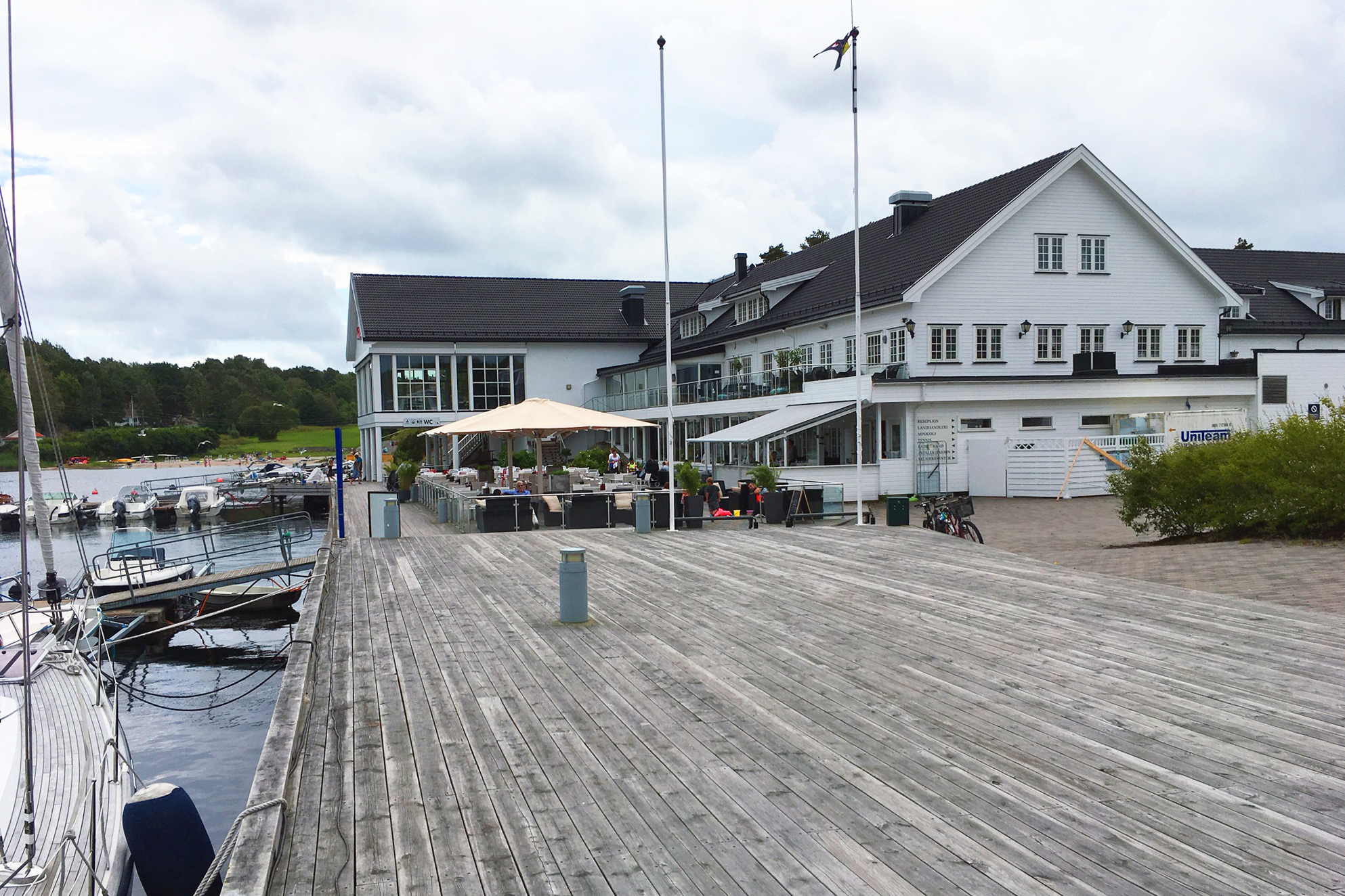 Havna hotell på Tjøme 2017